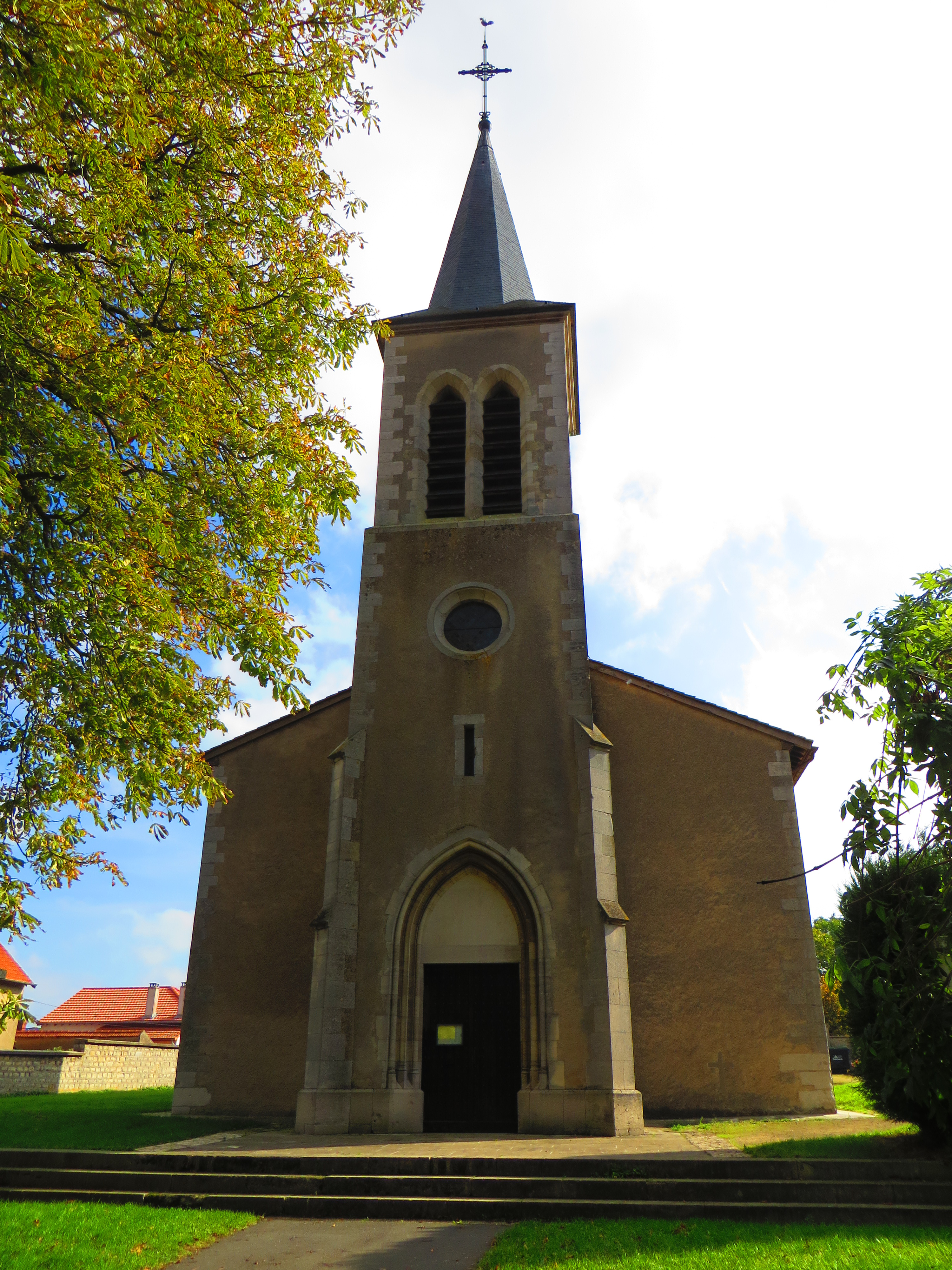 Fossieux l'église Sainte-Marguerite